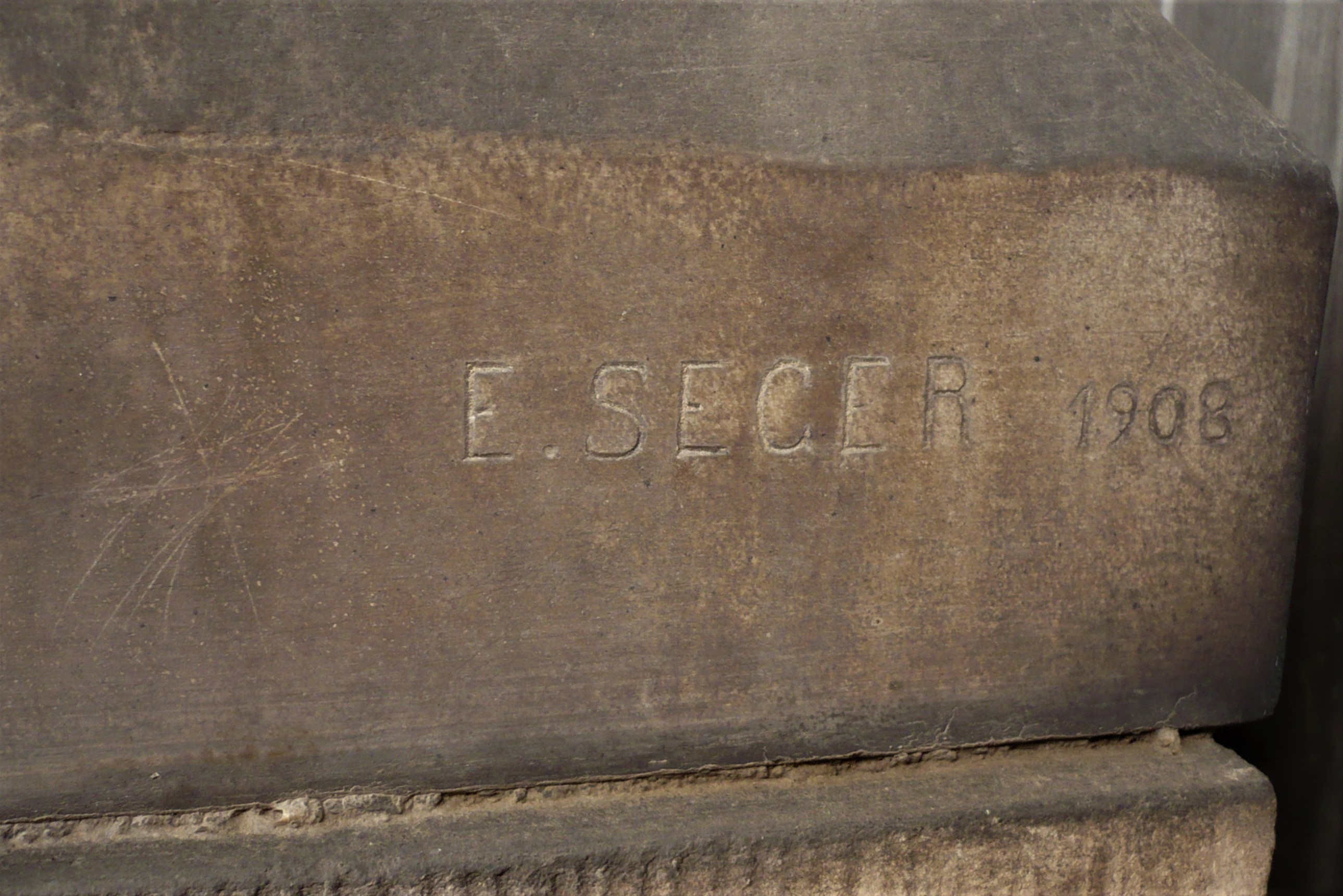 Figura Jezusa w grobowcu rodziny Nave, postument z podpisem rzeźbiarza